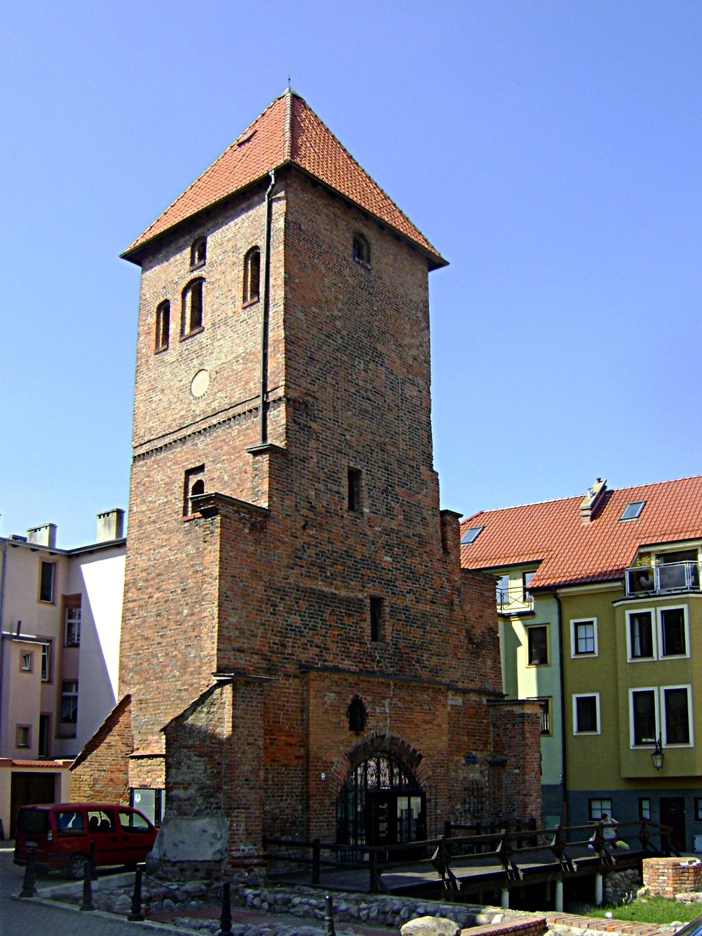 Bytów, ul. Jana Pawła II - kościół p.w. Św .Katarzyny, obecnie wieża (zabytek nr 338 i A-365 z 16.08.1965)